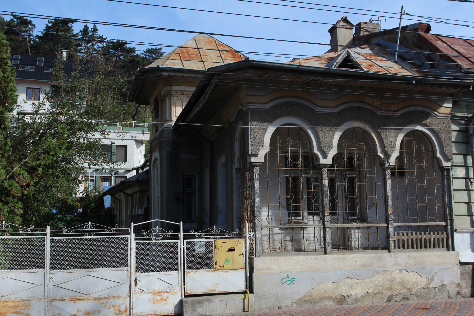 Casă Str.Stefan cel Mare nr.28